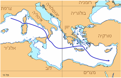 אוניית המעפילים תל חי - מסלול